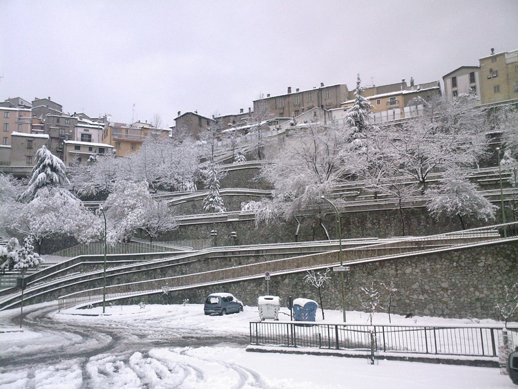 Villa Comunale SGF innevata Categoria:San Giovanni in Fiore